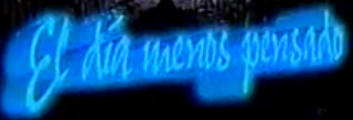 Logo usado desde 1999.